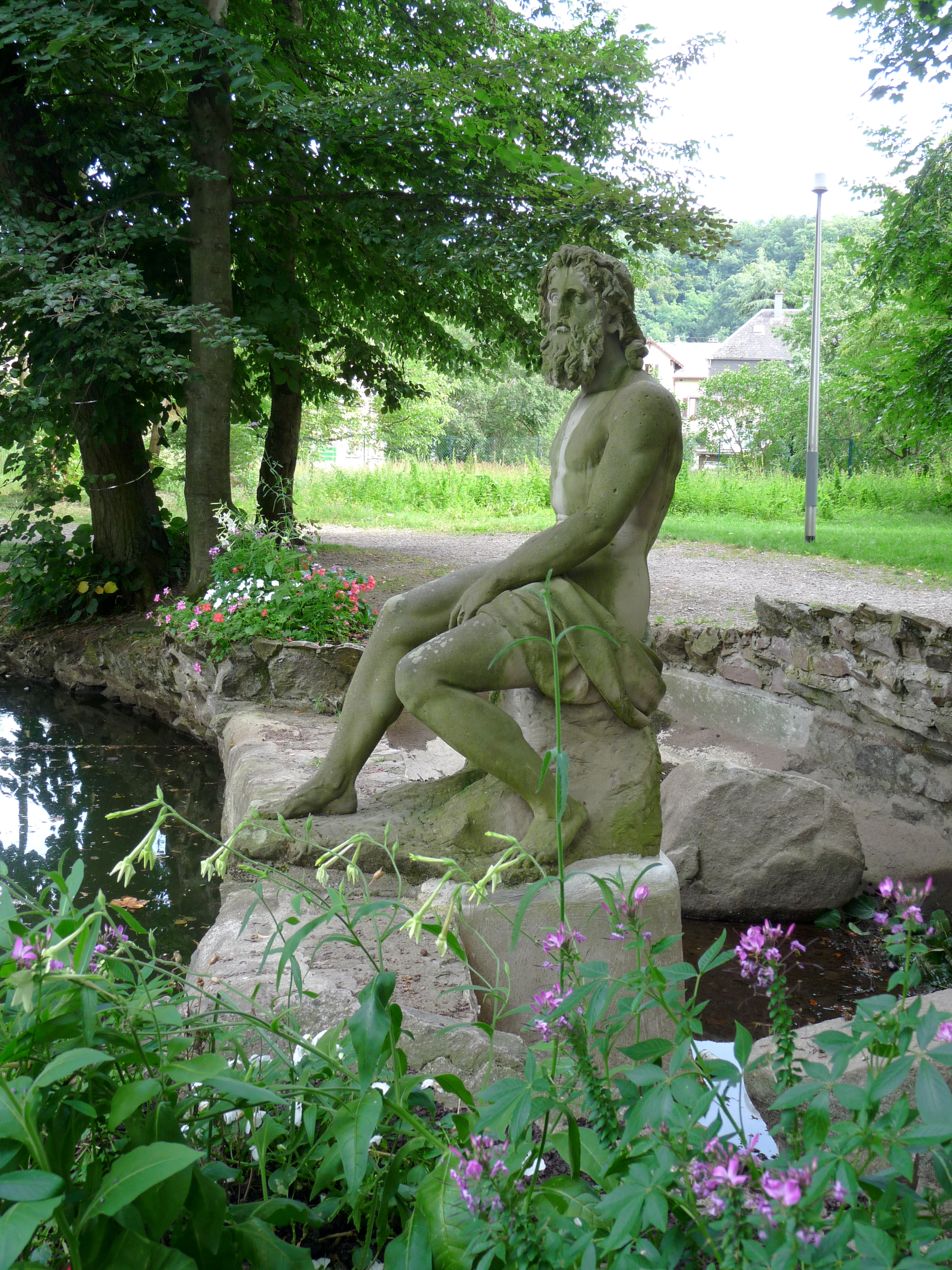 Neptune sculpté par Landolin Ohmacht (Parc de la Fecht, Munster, Haut-Rhin)